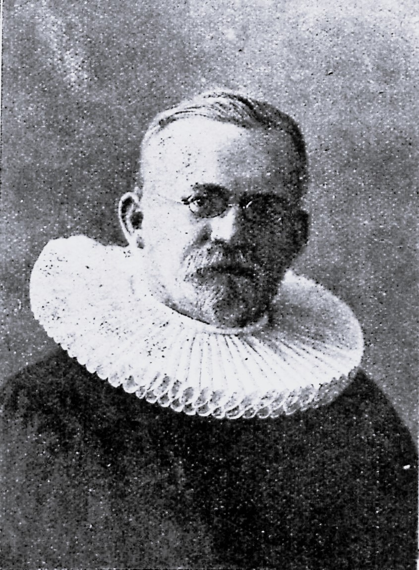 Alfred Haensel (* 2. Februar 1869 in Lübeck; † 22. April 1922 in Lübeck) war ein deutscher evangelisch-lutherischer Geistlicher und erster Pastor an St. Matthäi in Lübeck.